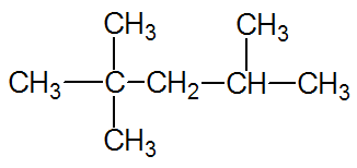 2,2 diméthyl-4 méthylpentane